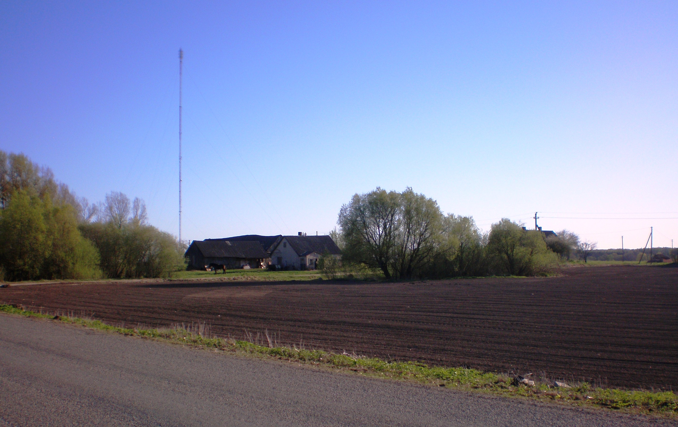 Dovydiškiai, Krakių sen., Kėdainių raj.